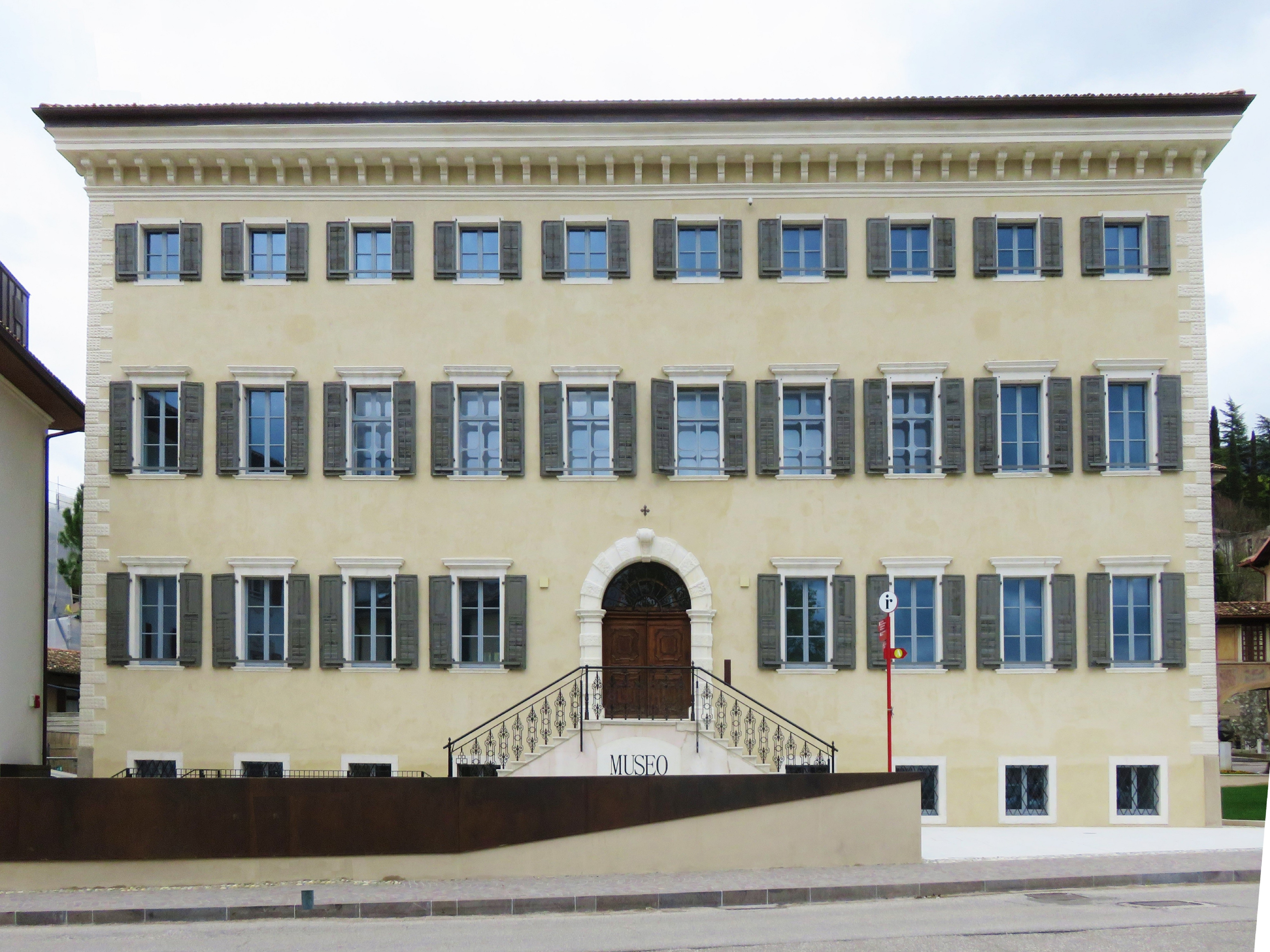 Palazzo Sichardt, a Rovereto. Sede del Museo della Città. Esterno.